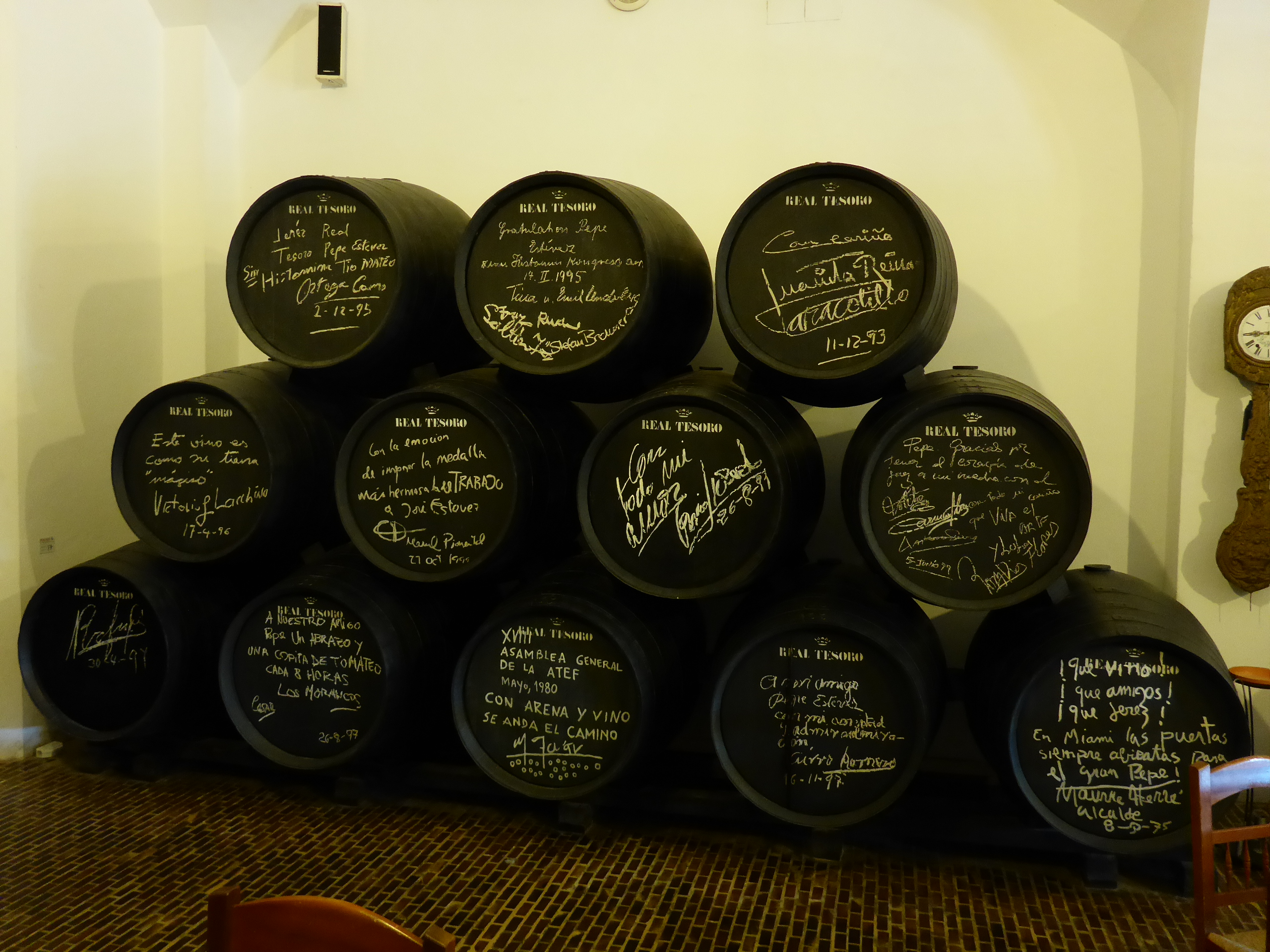 Bodegas Real Tesoro en Jerez de la Frontera